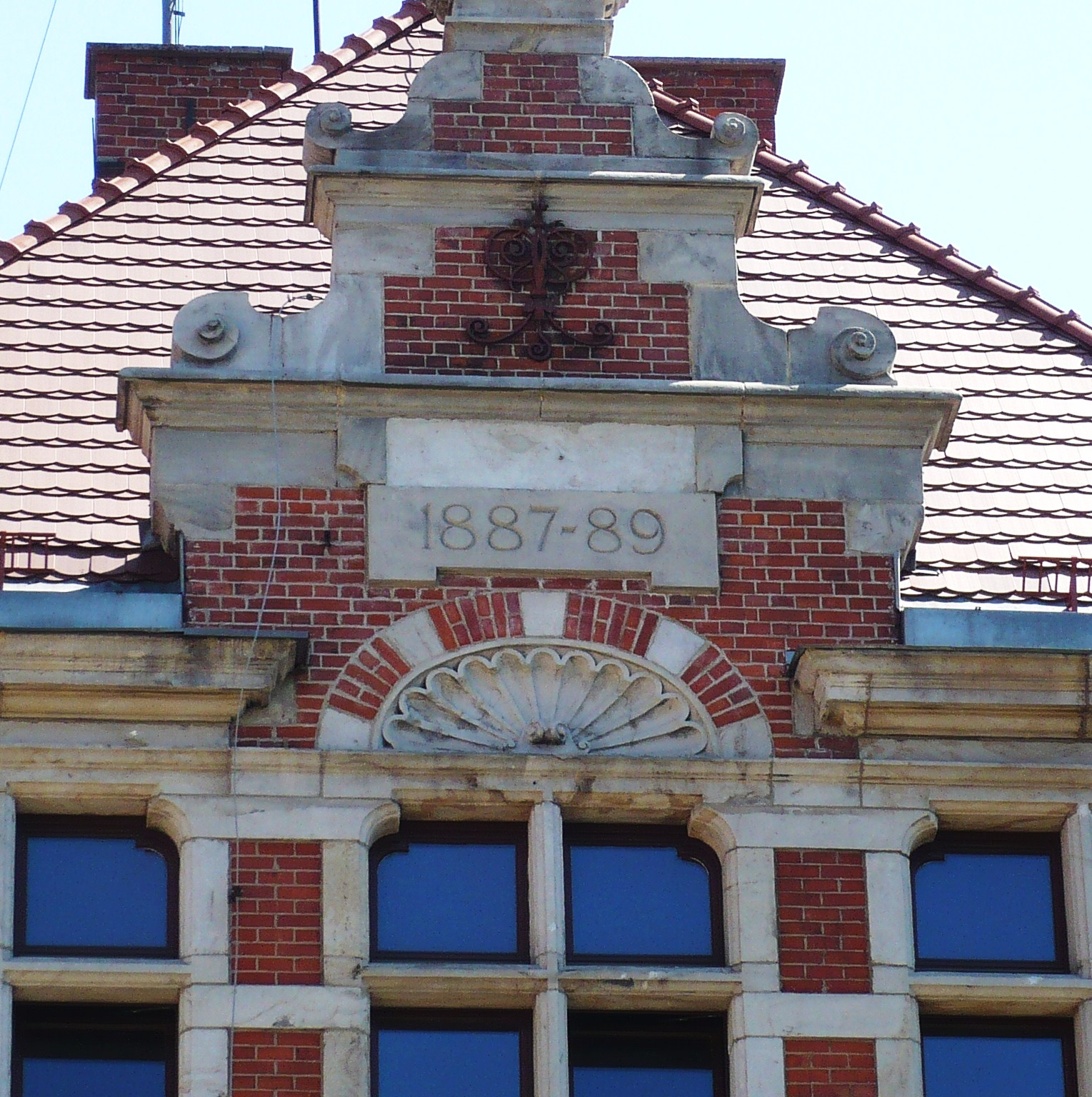 Nowa Ruda, ul. Bohaterów Getta 29 - pierwotnie sąd, obecnie komisariat policji, 1887-1889